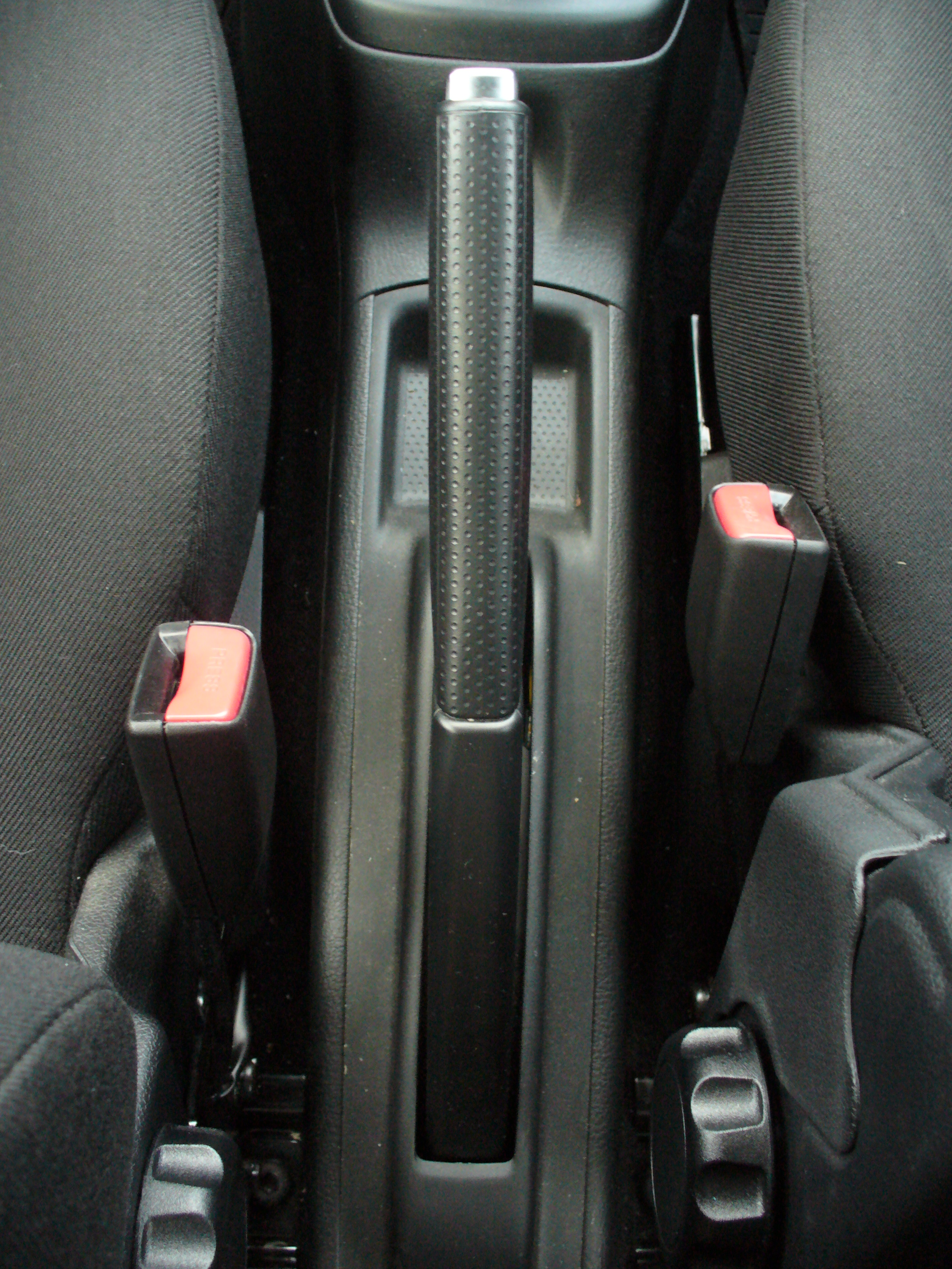 Mazda2 Handbremse